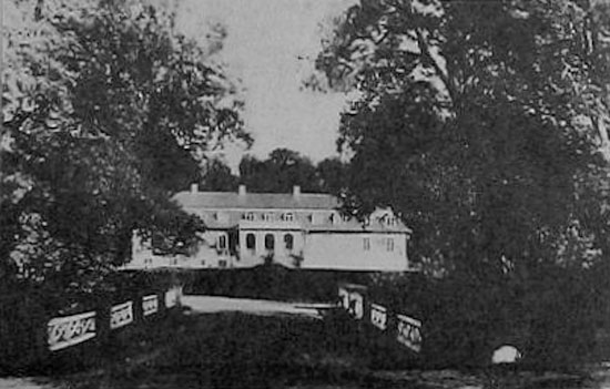 Беларуская (тарашкевіца): Каханавічы (Kachanavičy), сядзіба Храпавіцкіх (Chrapavicki)